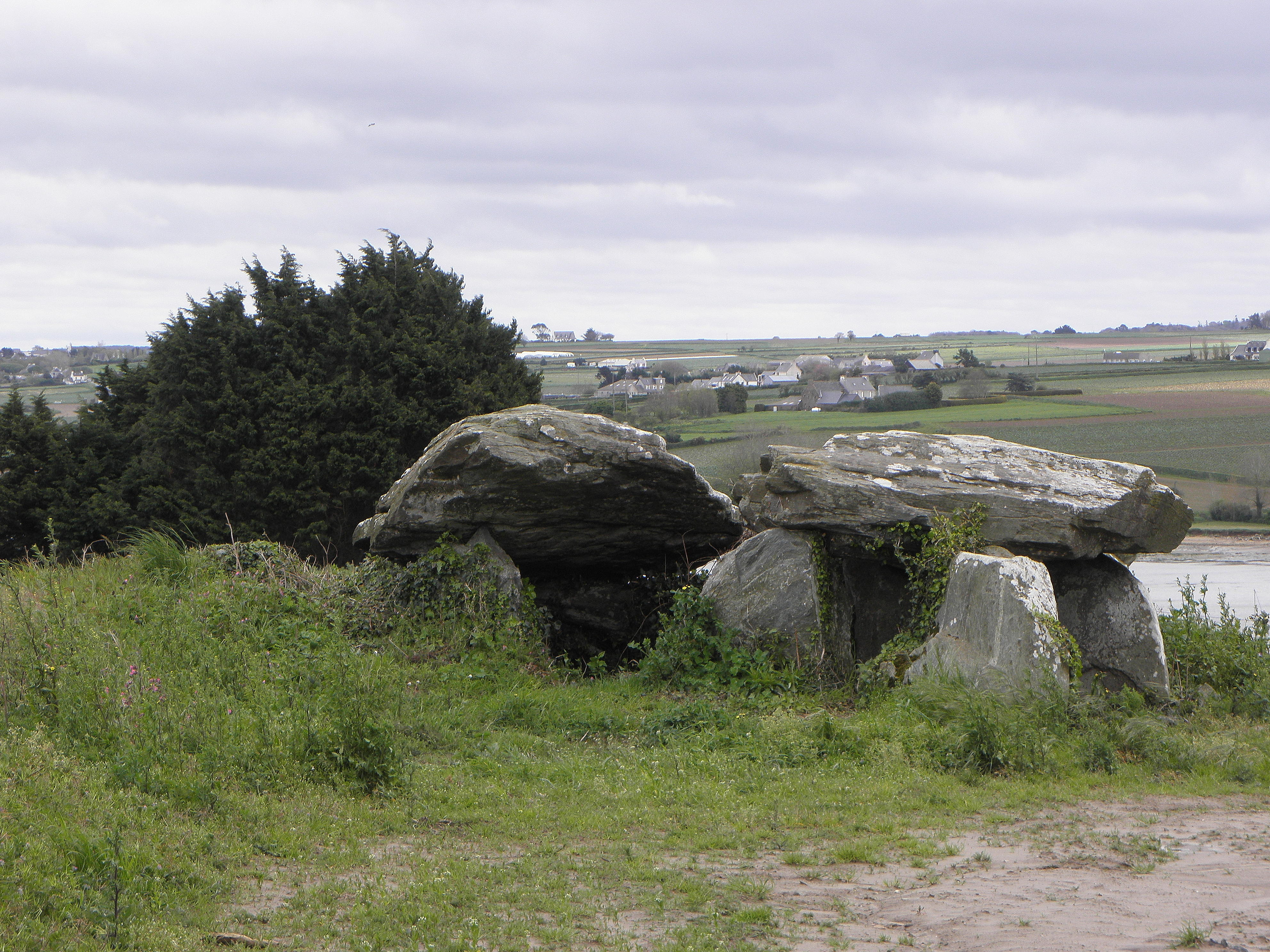 Dolmen de Boutouiller, Keranguez ou Kerivin, en Saint-Pol-de-Léon (29).